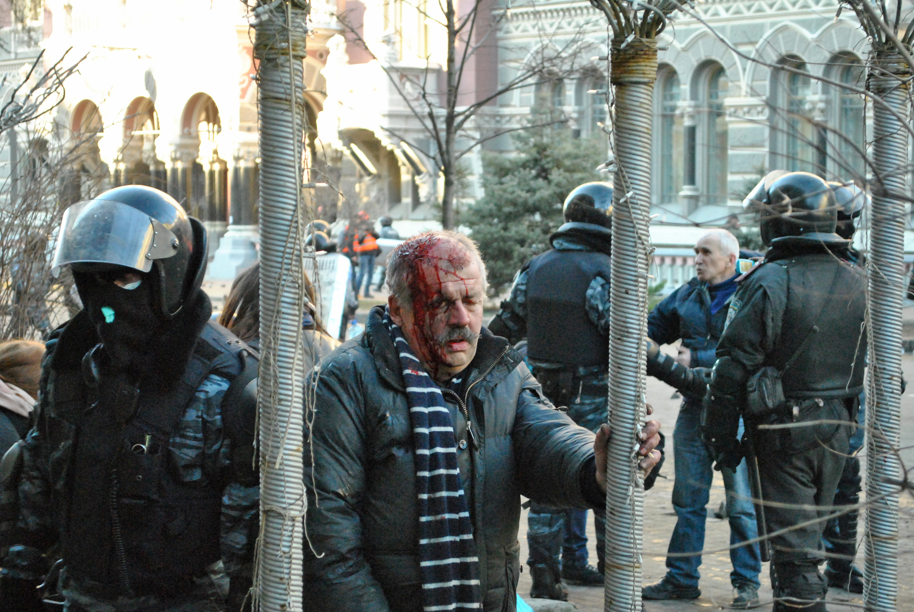 Побиття майданівців на вулиці Інститутській. Тарас Більчук серед силовиків.